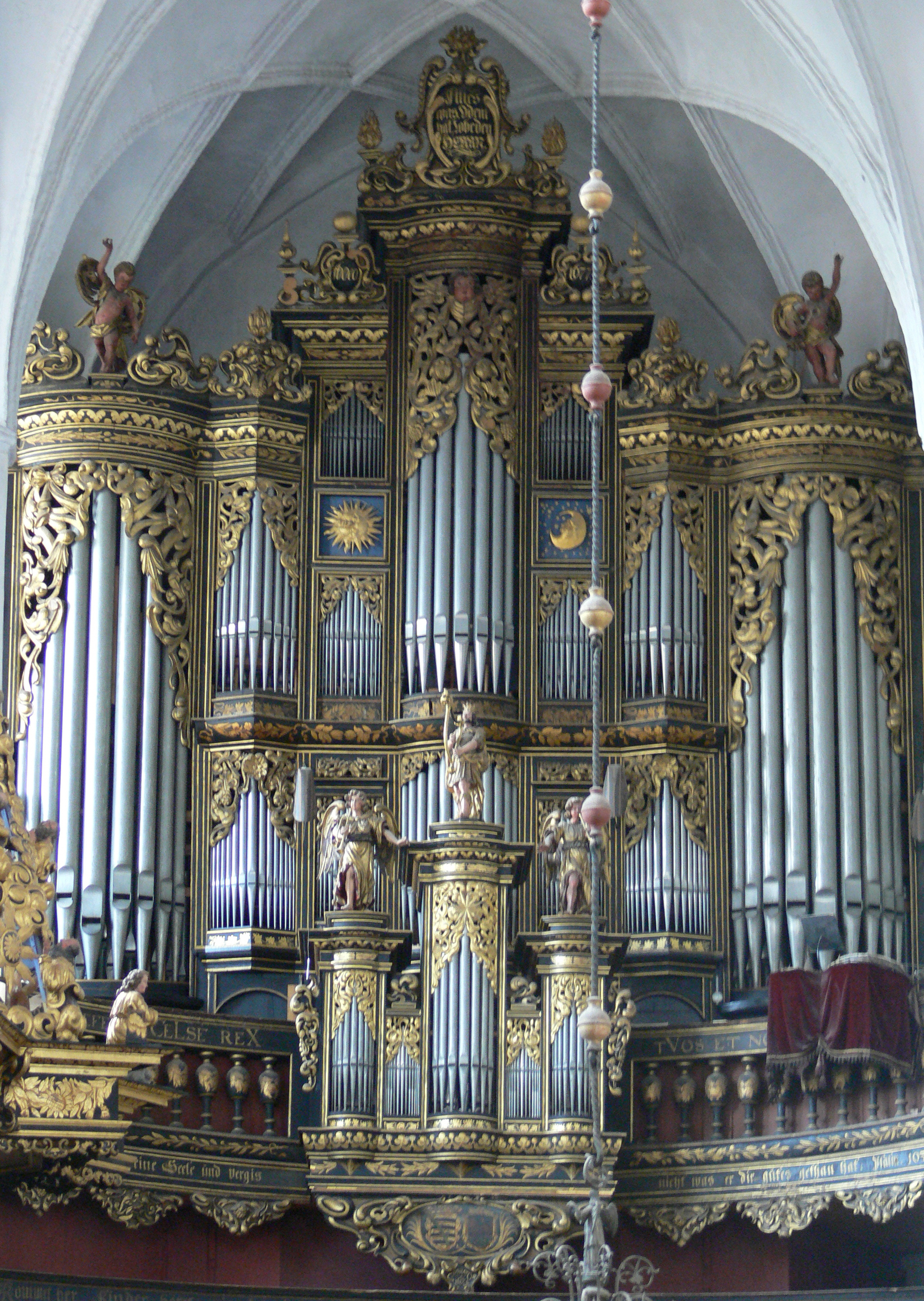 Luckau, Landkreis Dahme-Spreewald, Brandenburg St..-Nikolai-Kirche Orgel von Christoph Donat (1672-1673)